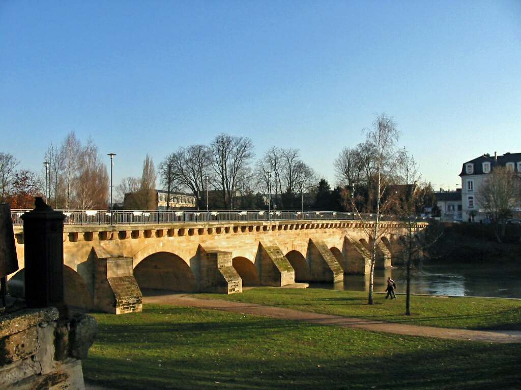 Vieux pont de Meulan (Yvelines) Photo JH Mora, janvier 2006